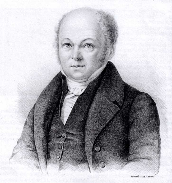 Litho van Willem Frederik Büchner